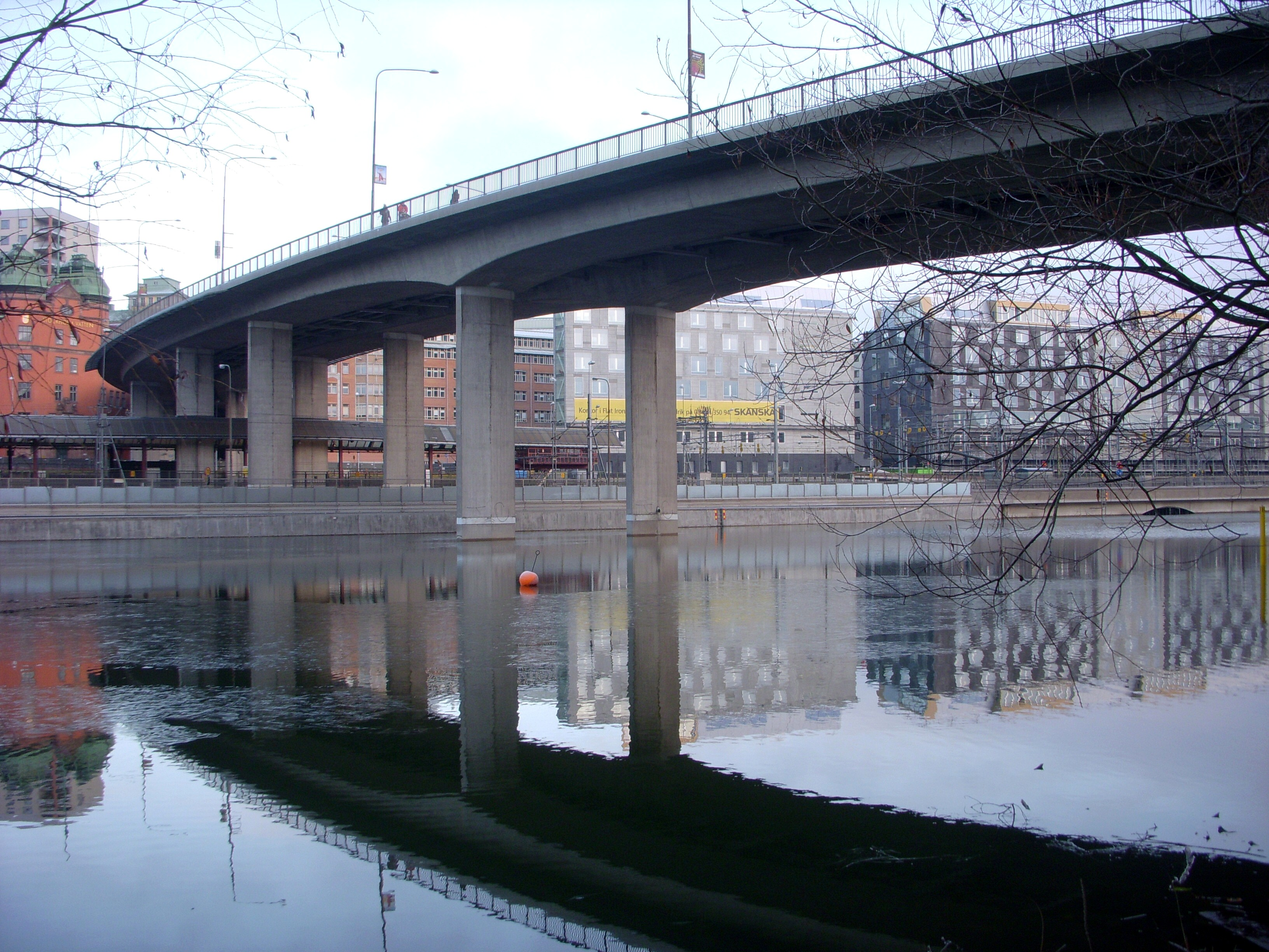 Barnhusbron i Stockholm med "Flat Iron Building" i bakgrunden